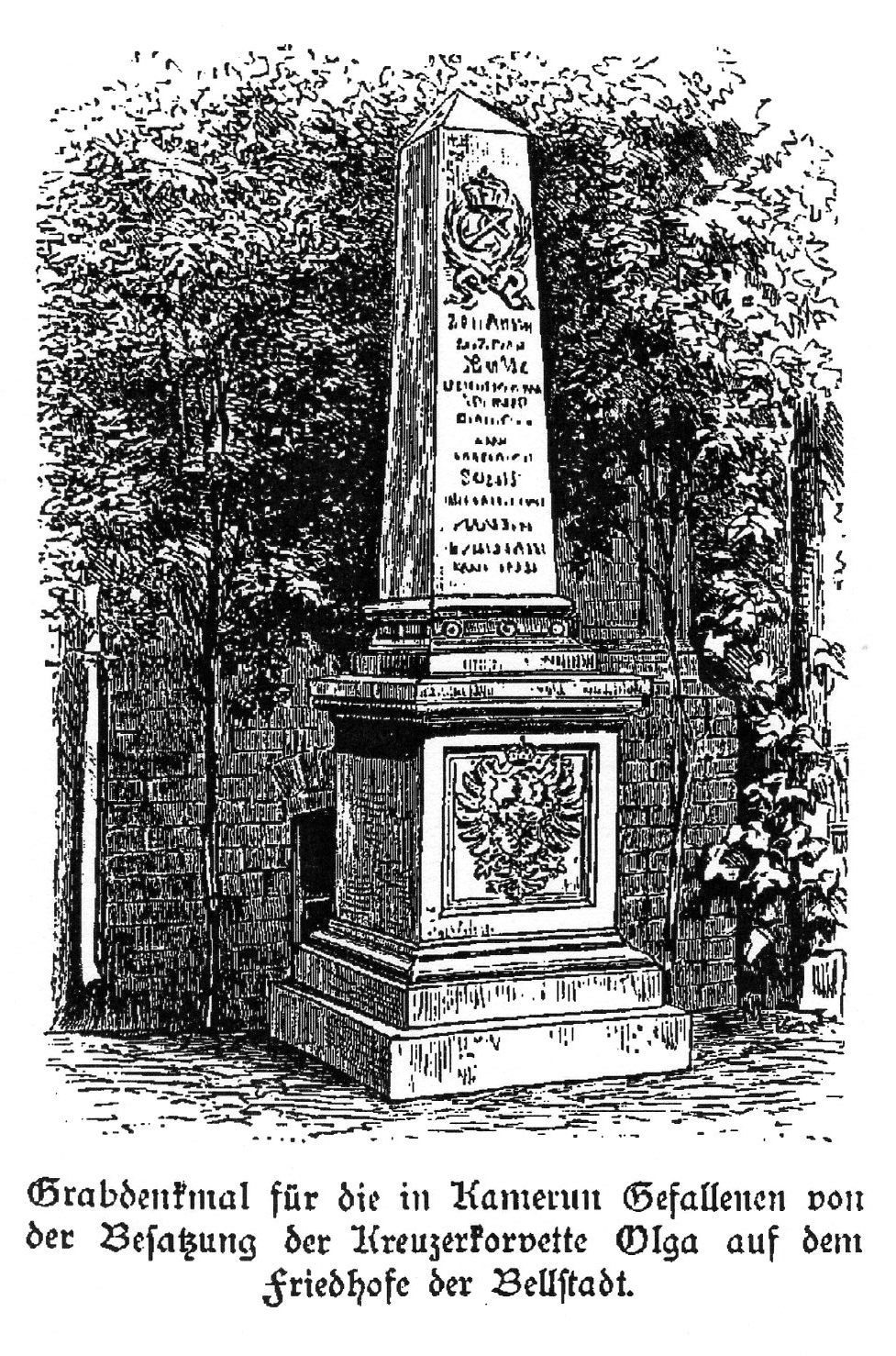 Denkmal für die 1884 Gefallenen von SMS OLGA in Bellstadt, heute Duala. Quelle: Gustav Meinecke, Die Deutschen Kolonien